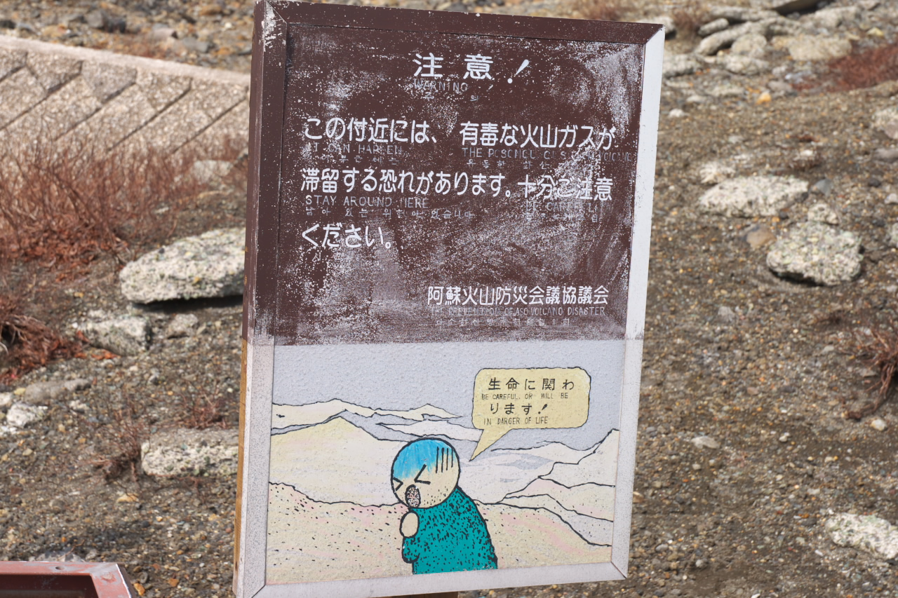 活火山である阿蘇山は小康状態とはいえ活動中であり、火山ガスが流れている。そのため、肺や心臓に病気のある人は命の危険があるとのことで看板が立っている。濃度が高くなると、病気と関係なく一切立ち入り禁止になる。 [MAP by ALPSLAB]